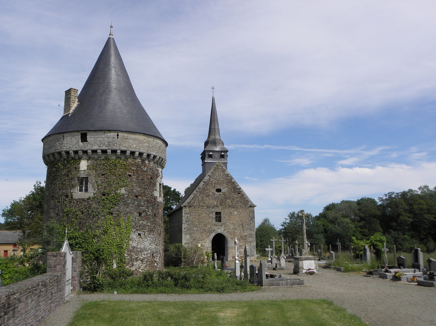 Église Saint-Loup du Lou-du-Lac (35).